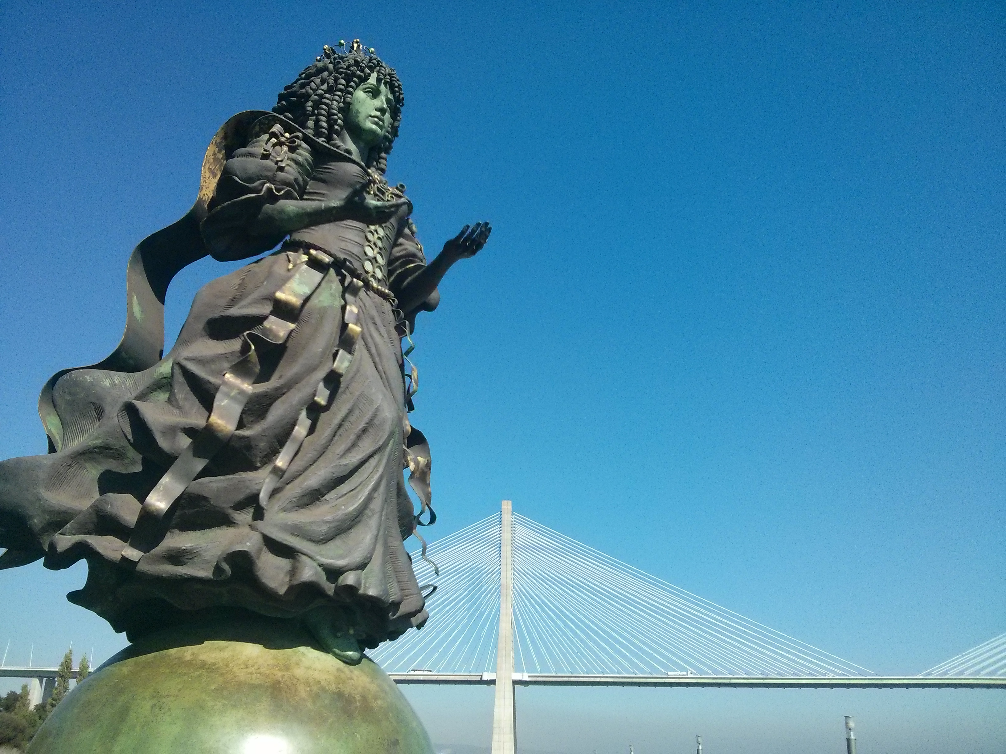 Lisbon